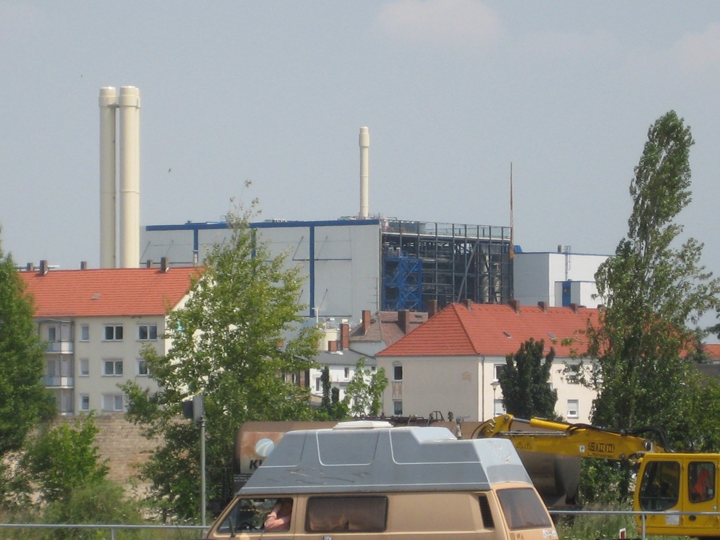 Müllverbrennungsanlage in Bernburg, vom Bahnhof aus fotografiert